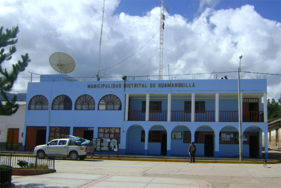 Municipalidad Distrital de Huamanguilla